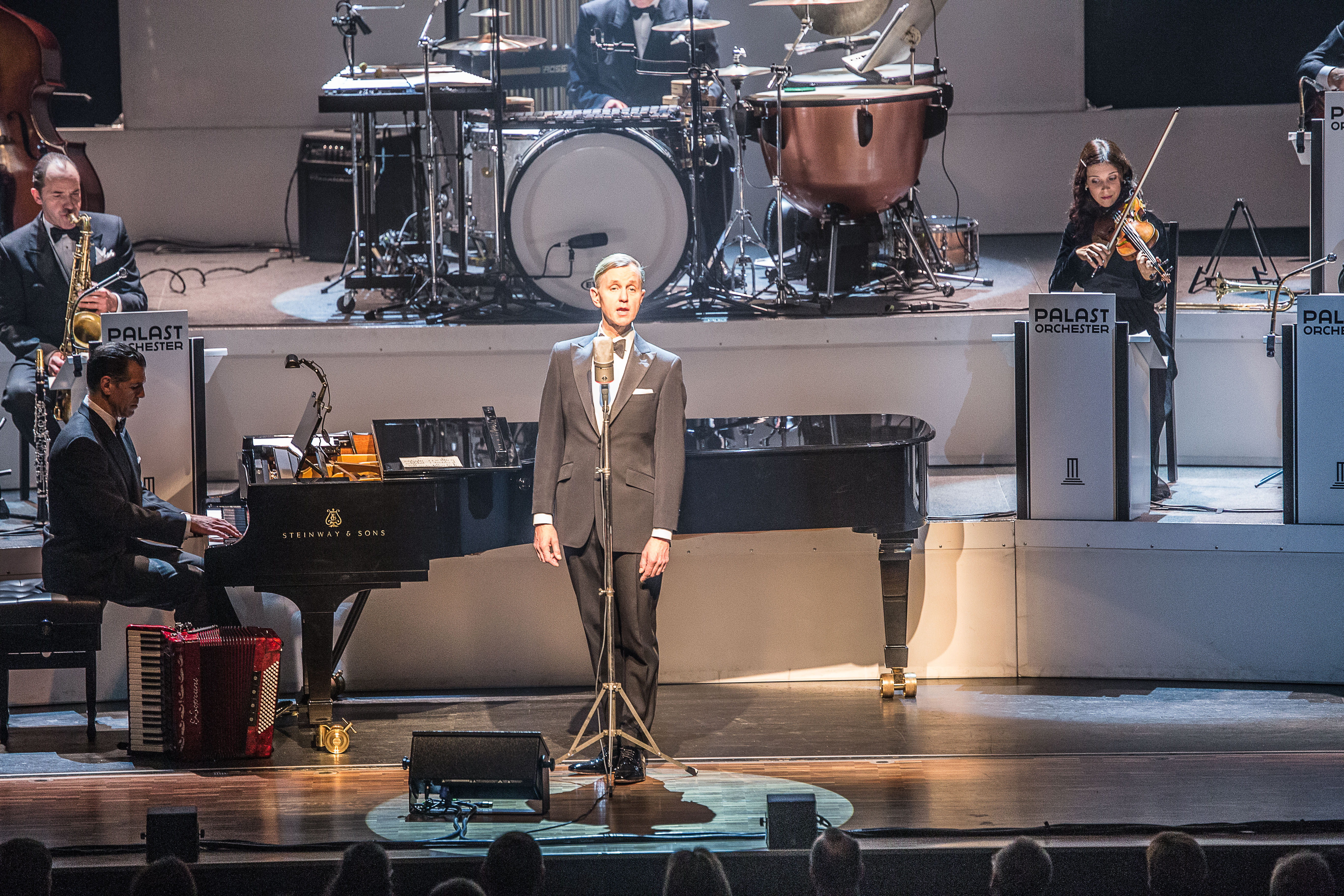 Congress Centrum Heidenheim, Sa. 26.11.2016